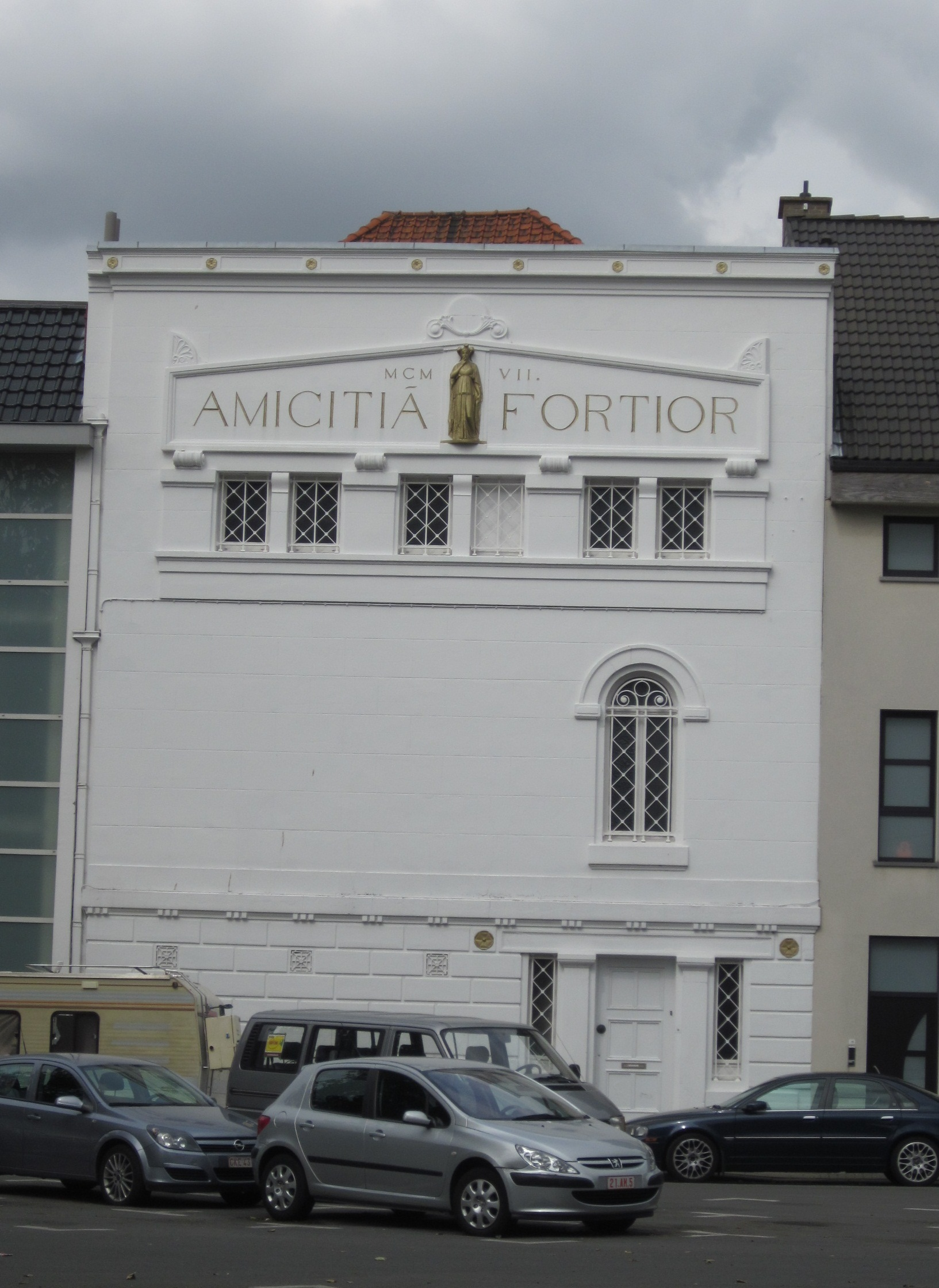 Vrijmetselaarsloge, Houtmarkt 18 Kortrijk 24″ N, 3° 16′ 16.75″ E